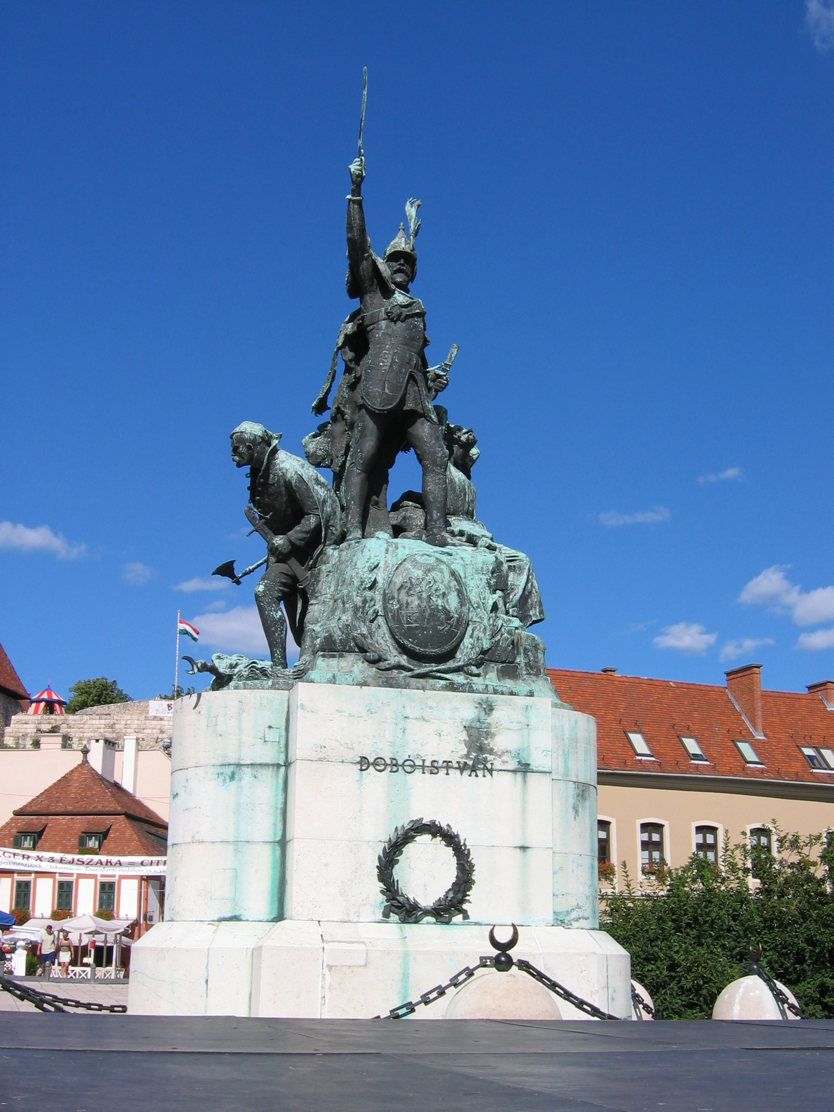 Statue de Dobo Istvan à Eger